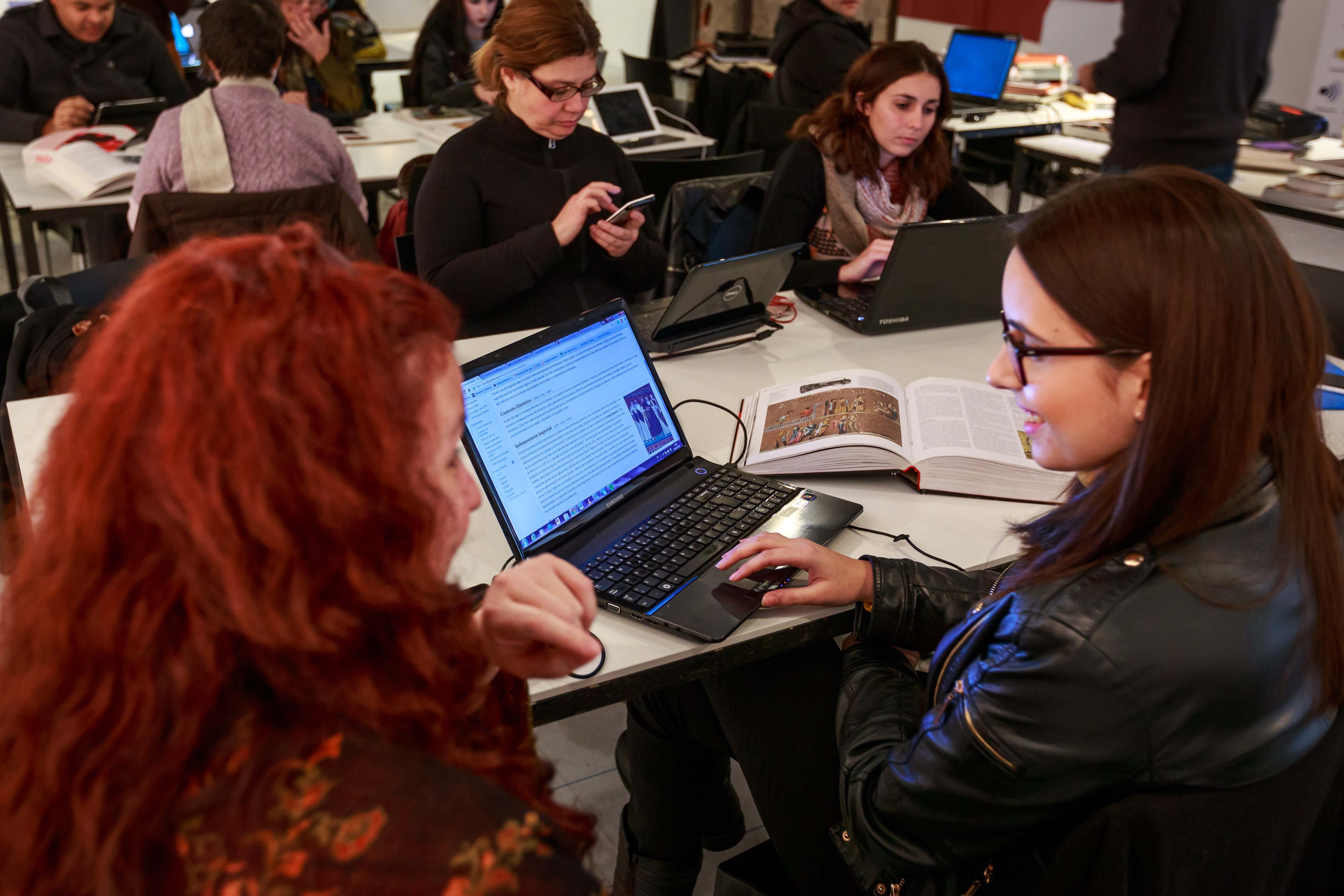 Editatón Editatón Europeana Fashion Madrid 2015. Matadero de Madrid.